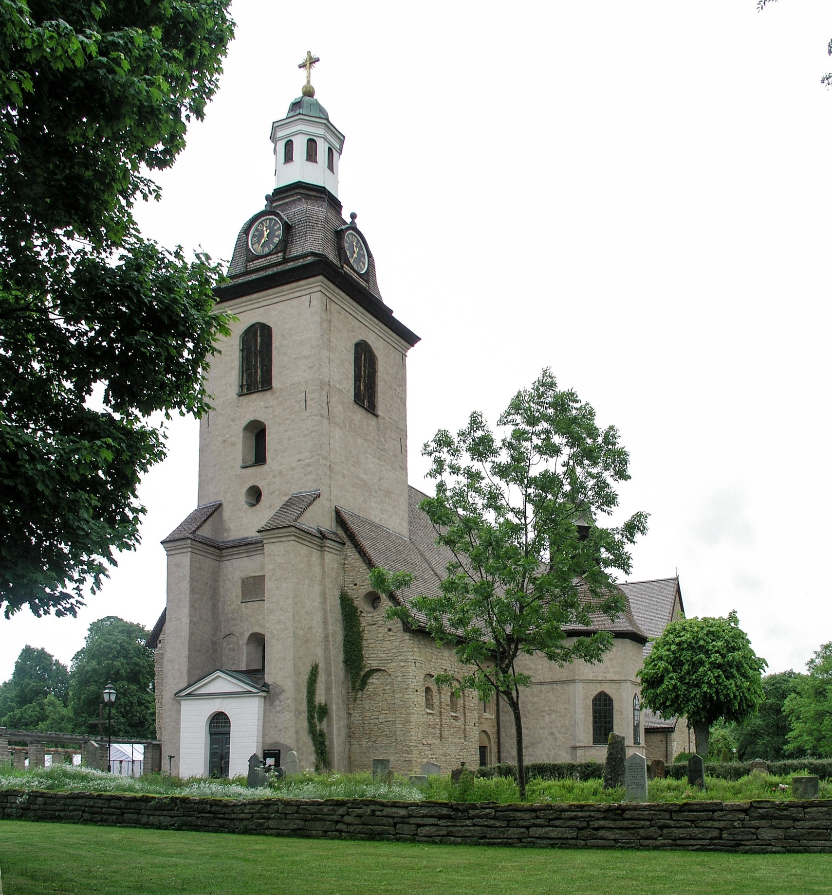 Vreta Klosterkyrka; Vreta Monastery Church